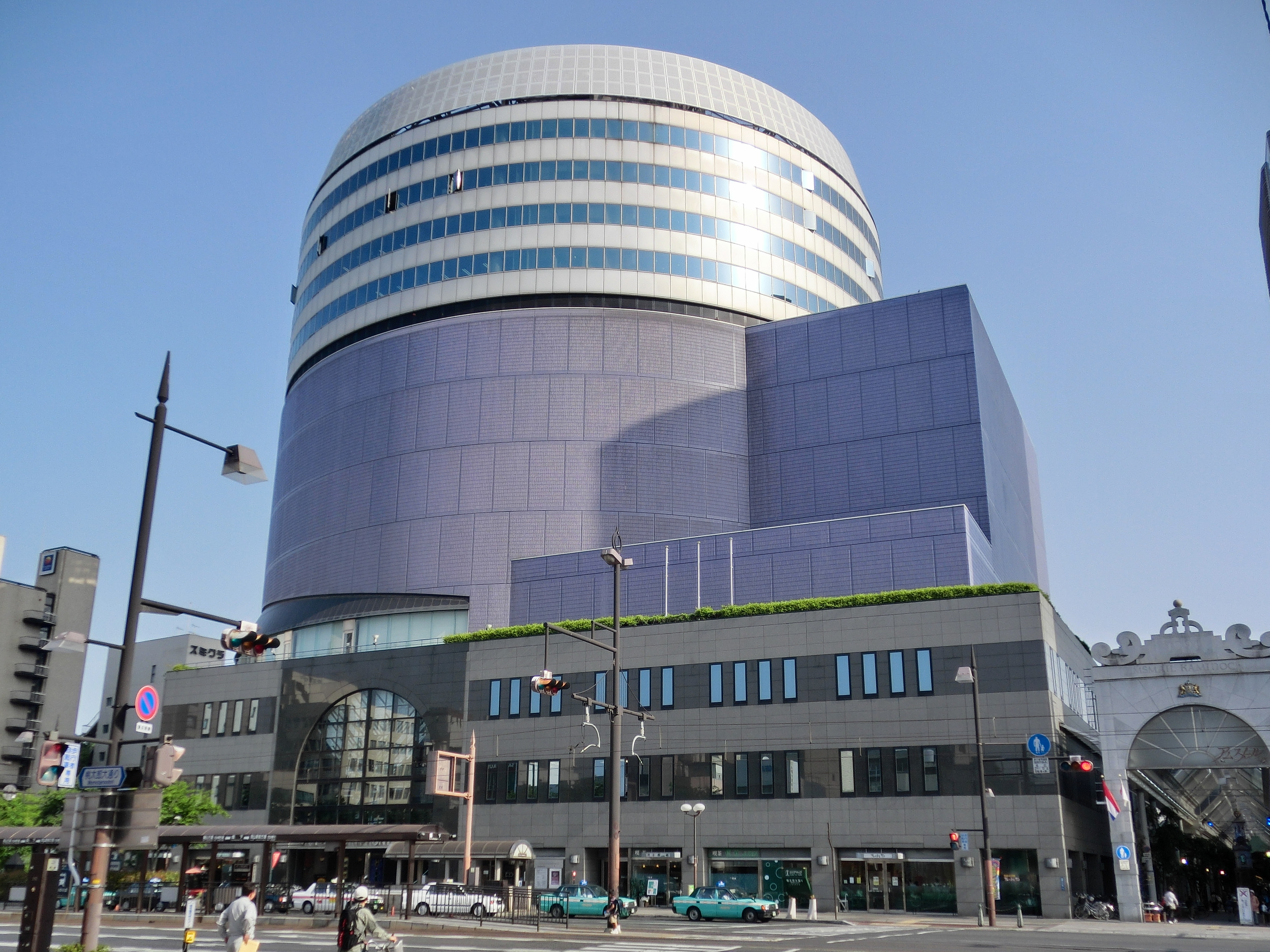 シンフォニービル by takeokahp